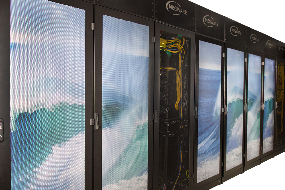 HPC-Cluster CooLMUC-3 mit ColdCon®-Warmwasser-Direktkühlung